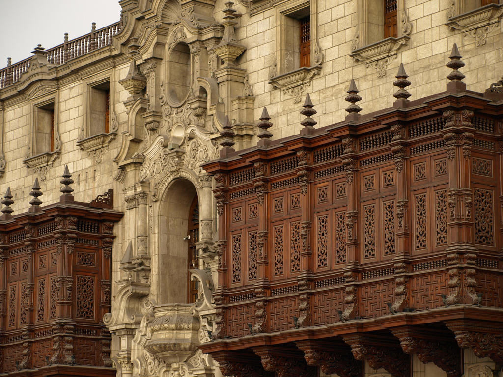 balcon limeño del virreynato